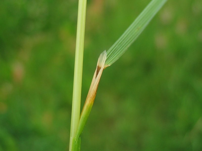 Rasen-Schmiele (Deschampsia cespitosa), Blattscheide und Blatthäutchen (Ligula), Gragetopshof